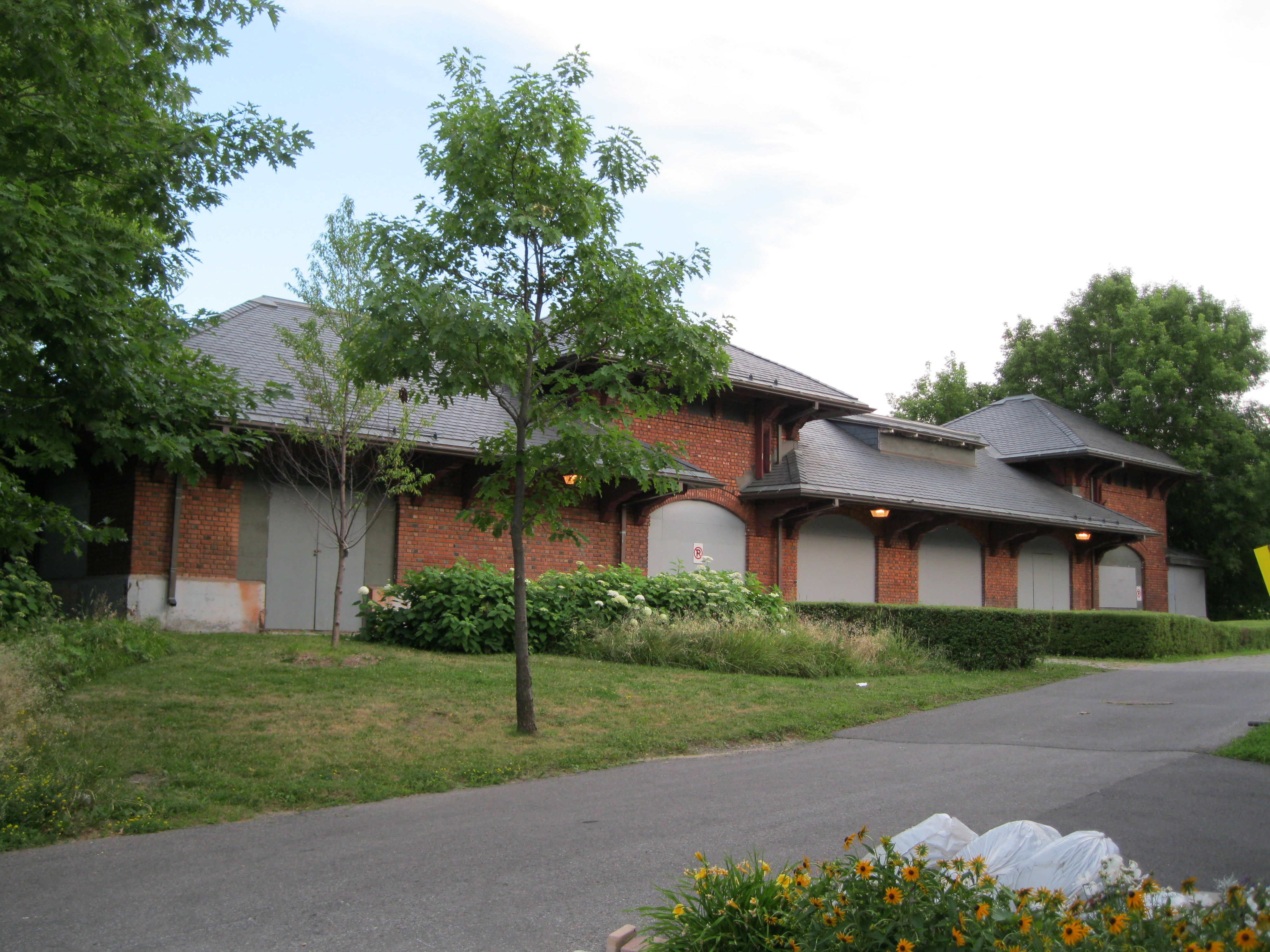 Gare ferroviaire du Canadien Pacifique, 4848, rue Ste-Catherine Ouest, Westmount, Québec, H3Z, Canada